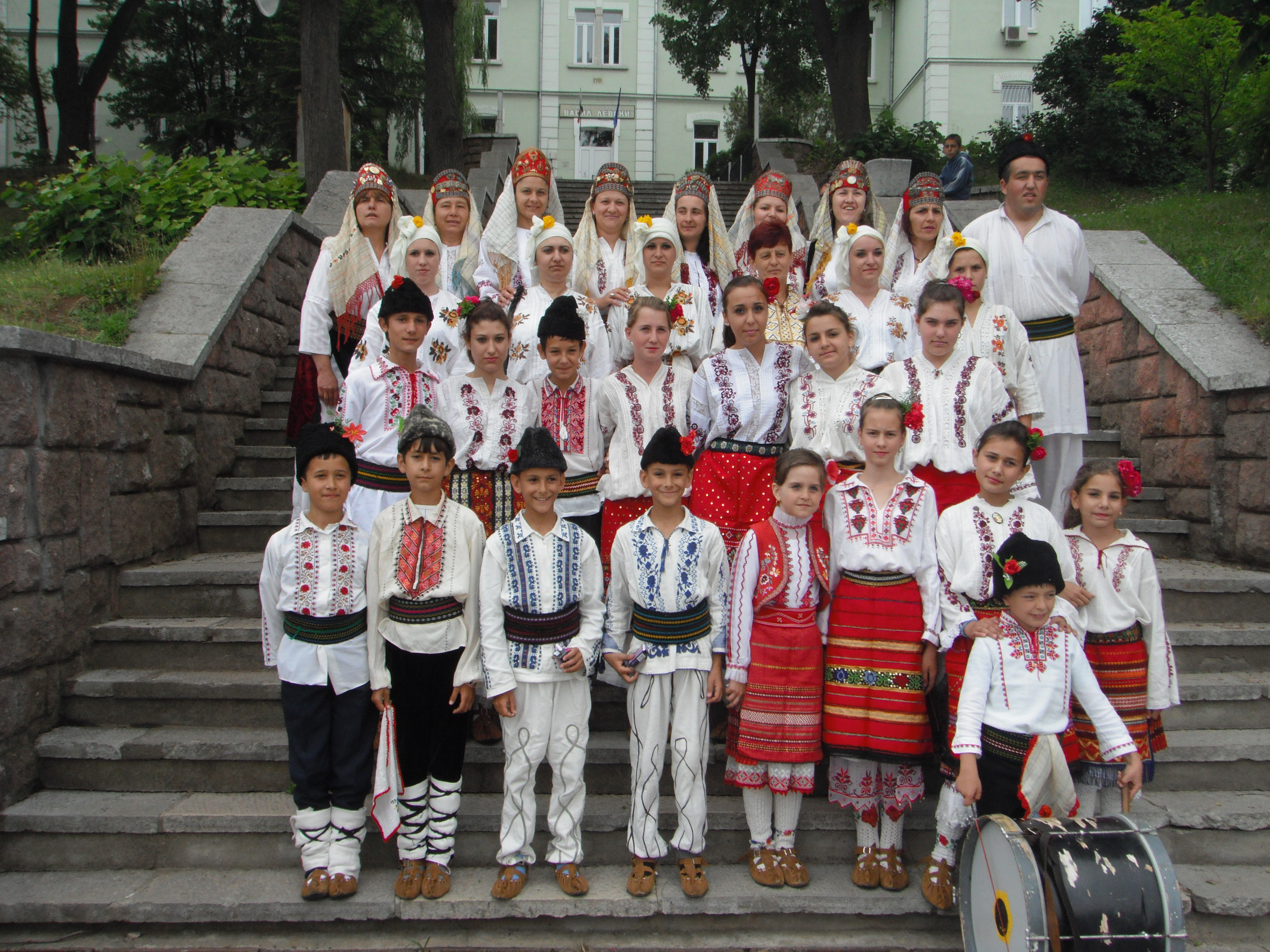 ФТС "Негованче" и ФТС "Влаинките" 2011